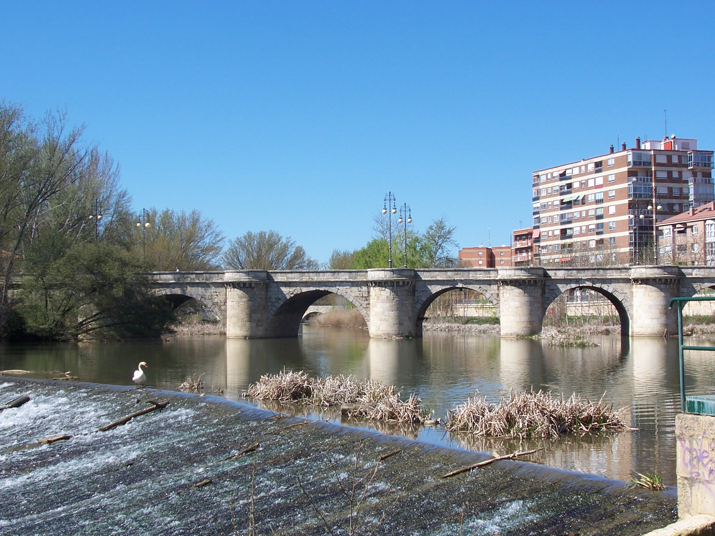 Puente mayor en Palencia